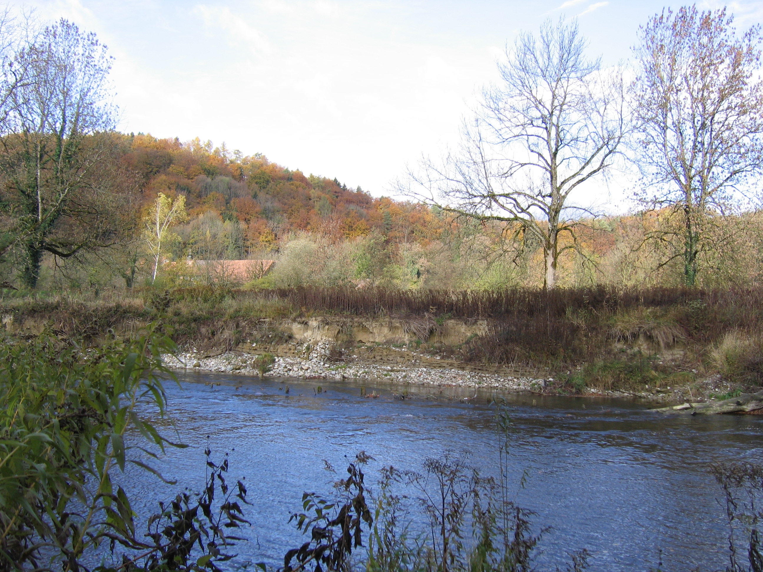 Deutschland - Baden-Württemberg - Bodenseekreis - Kressbronn - Ortsteil Gießenbrücke: Steilufer an der Argen